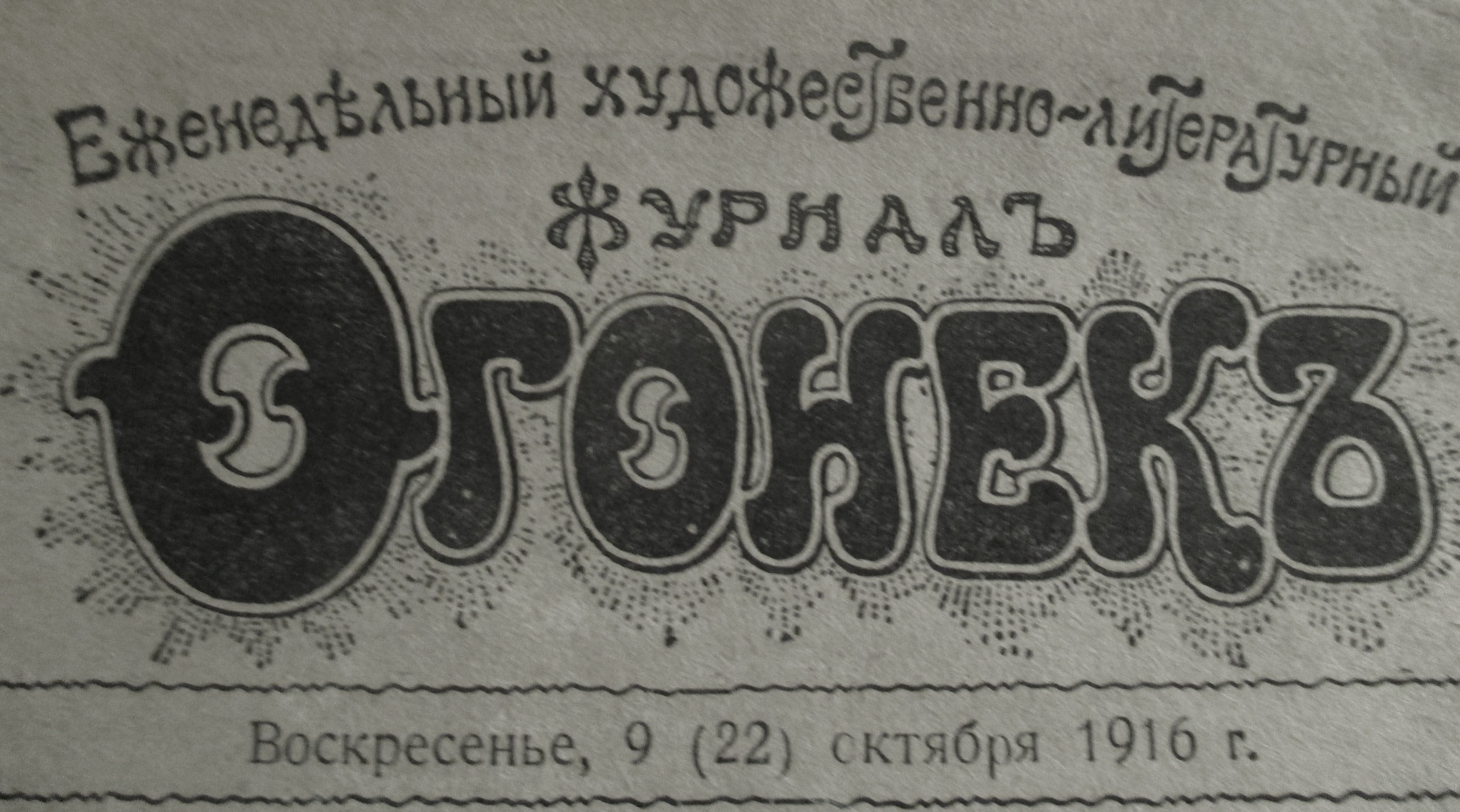 Titre de la revue Ogoniok